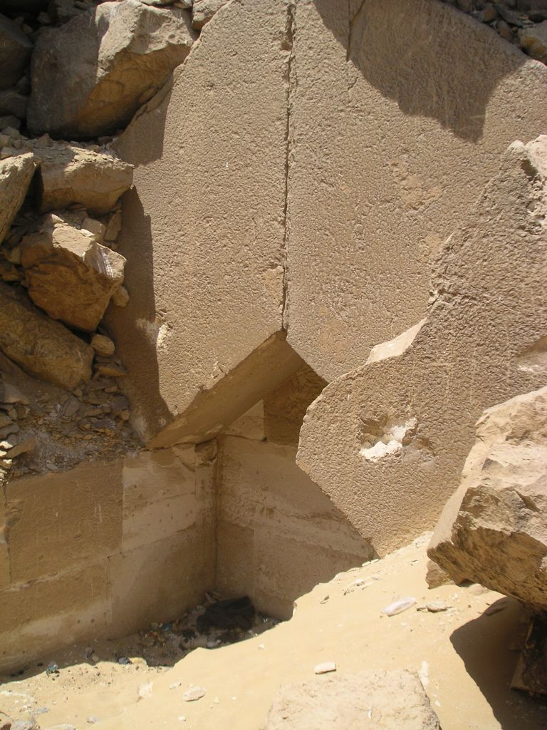 Chambre funéraire de la pyramide de reine d'Ouserkaf - Saqqarah - Ve dynastie égyptienne